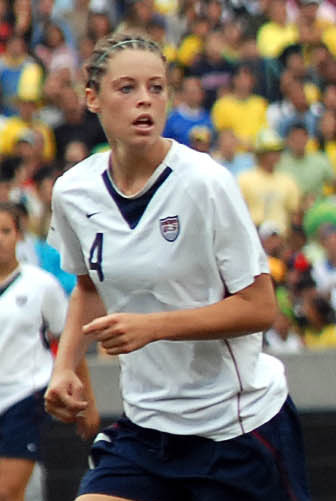 Rio de Janeiro - Equipe brasileira de futebol feminino ganha medalha de ouro nos jogos Pan-americanos do Rio de Janeiro, após vitória de 5 a 0 sobre a equipe dos Estados Unidos Foto: Wilson Dias/ABr